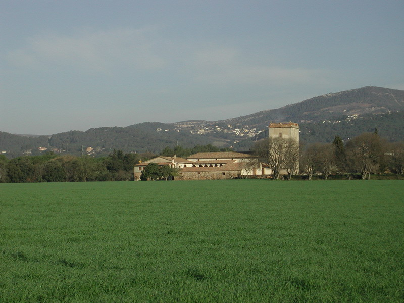 Can Draper- l'Ametlla del Vallès (Catalunya).